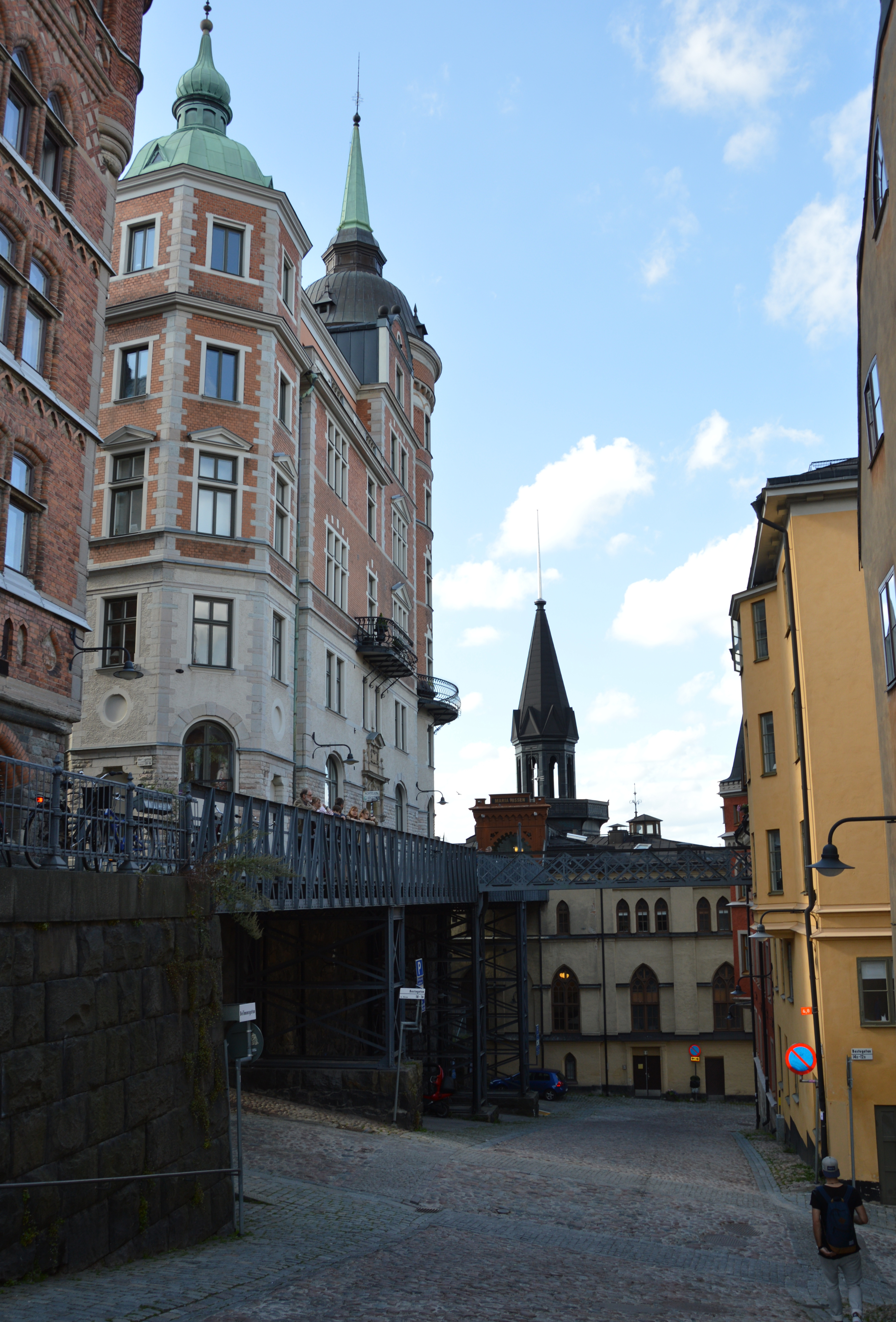 Mariaberget